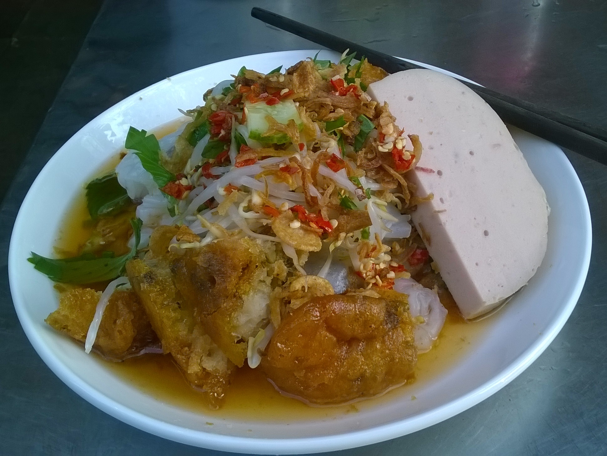 Bánh cuốn Saigon